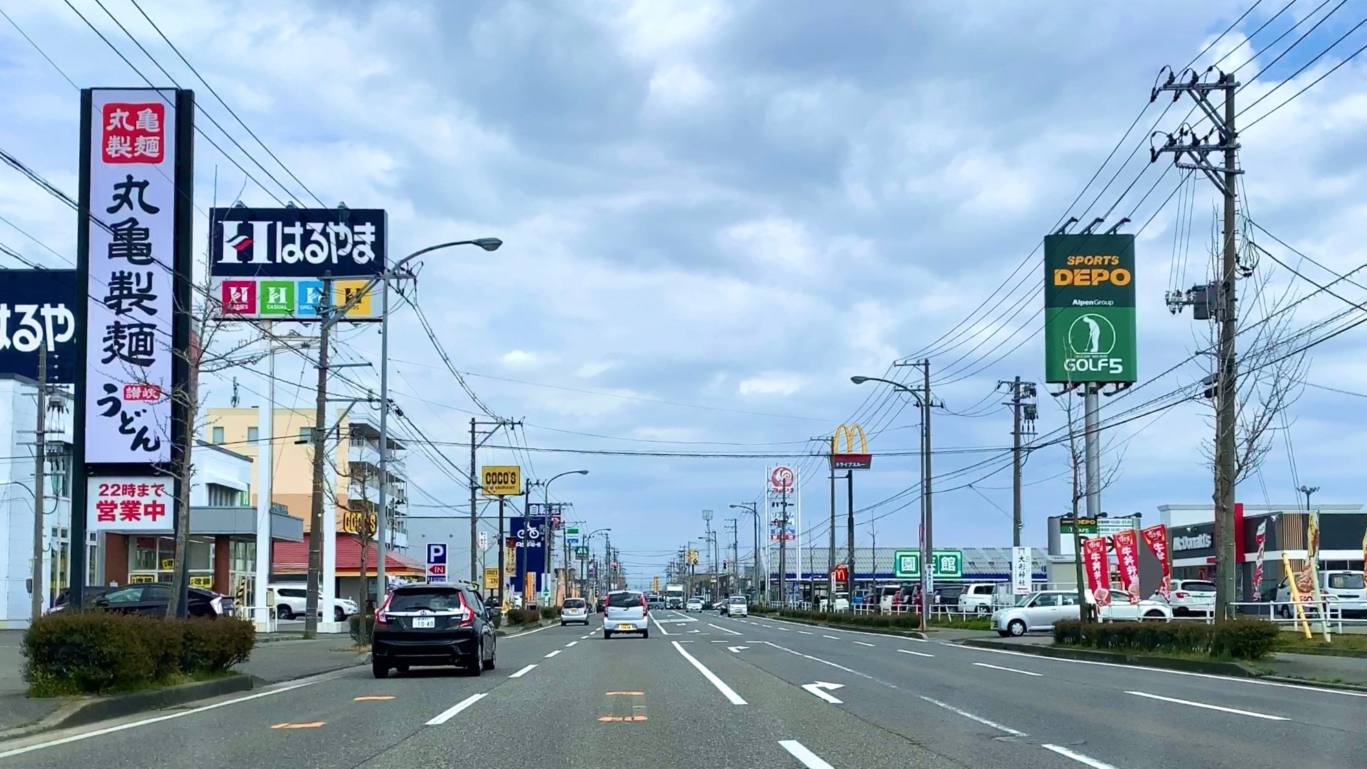 山の下東港線 河渡付近（新潟市東区，2020年4月）